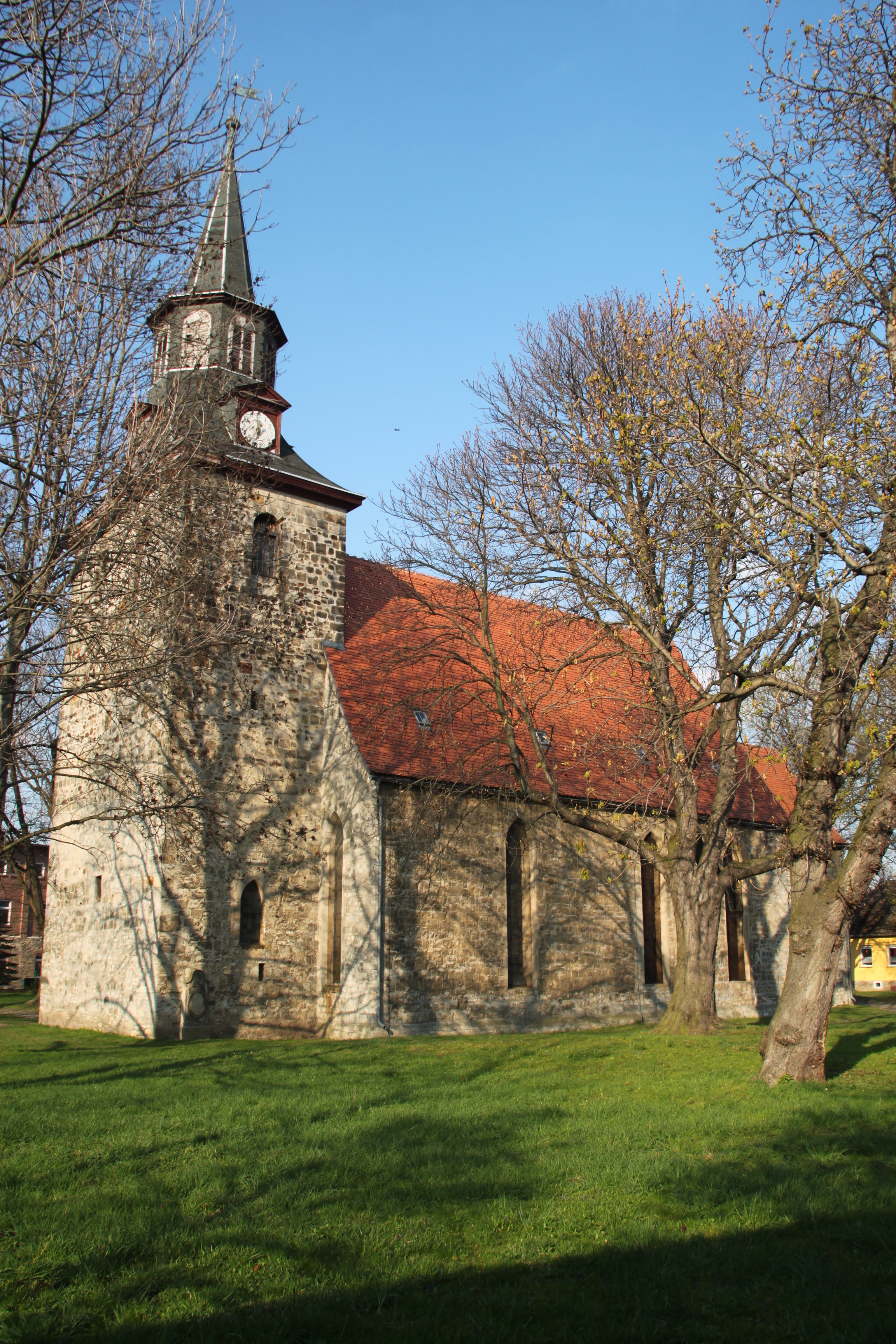 Seeland-Hoym, ev. Stadtkirche St. Johannis